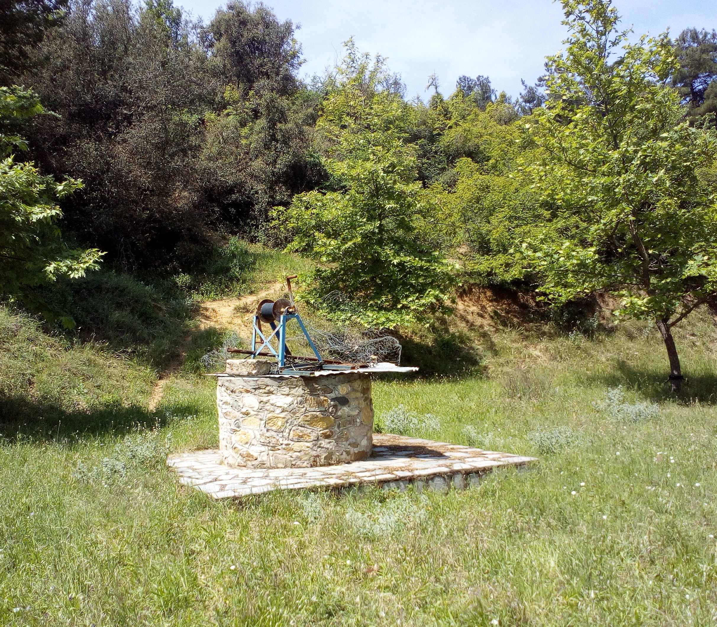 Παλιό πηγάδι από τα μακεδονικά χρόνια.